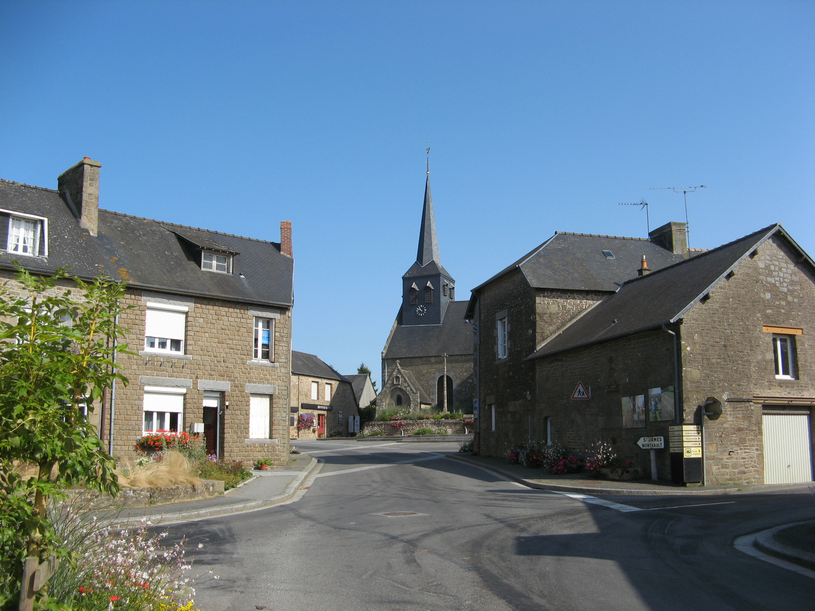 Village de Mellé